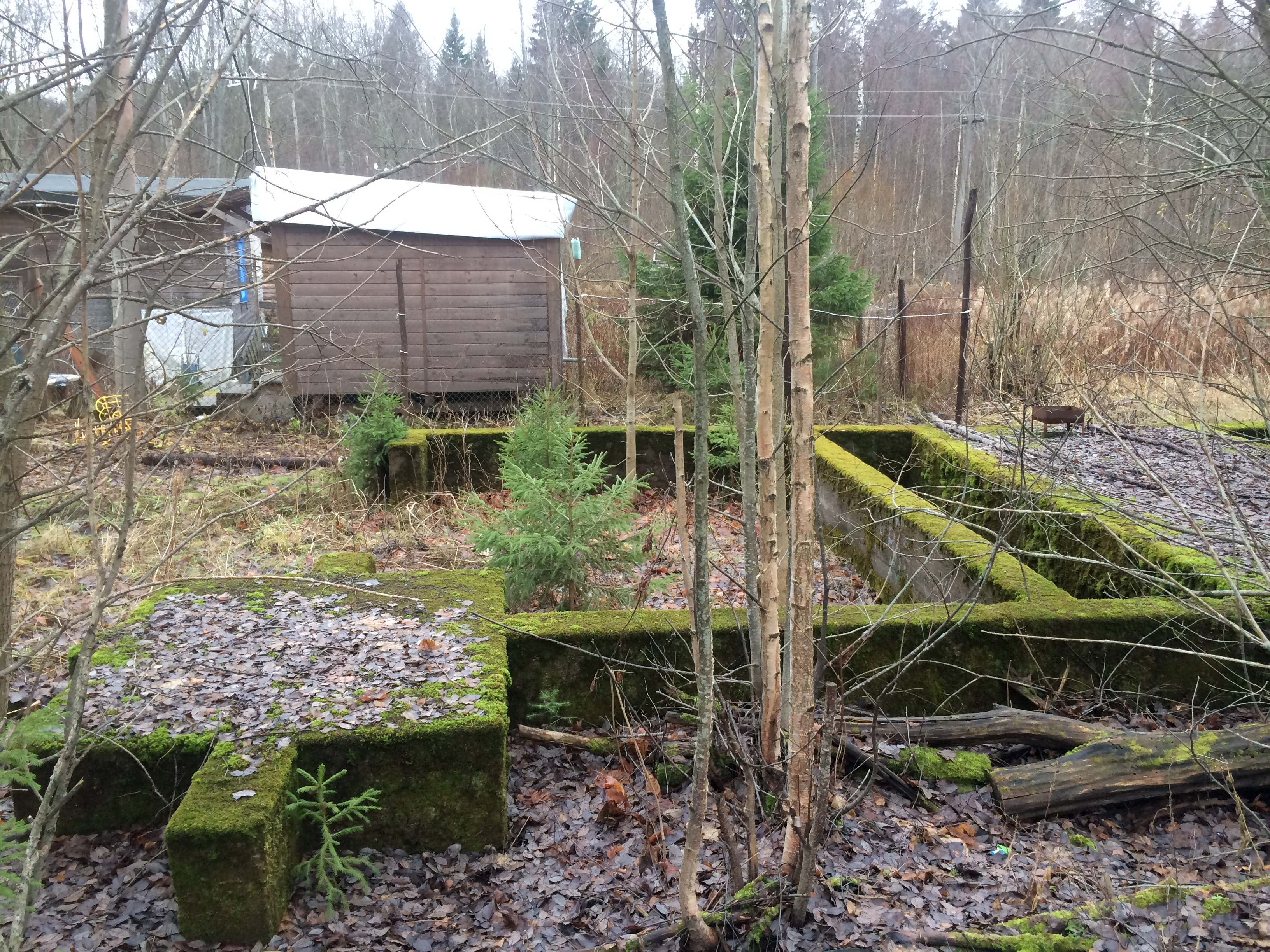 Местерьярви фундамент